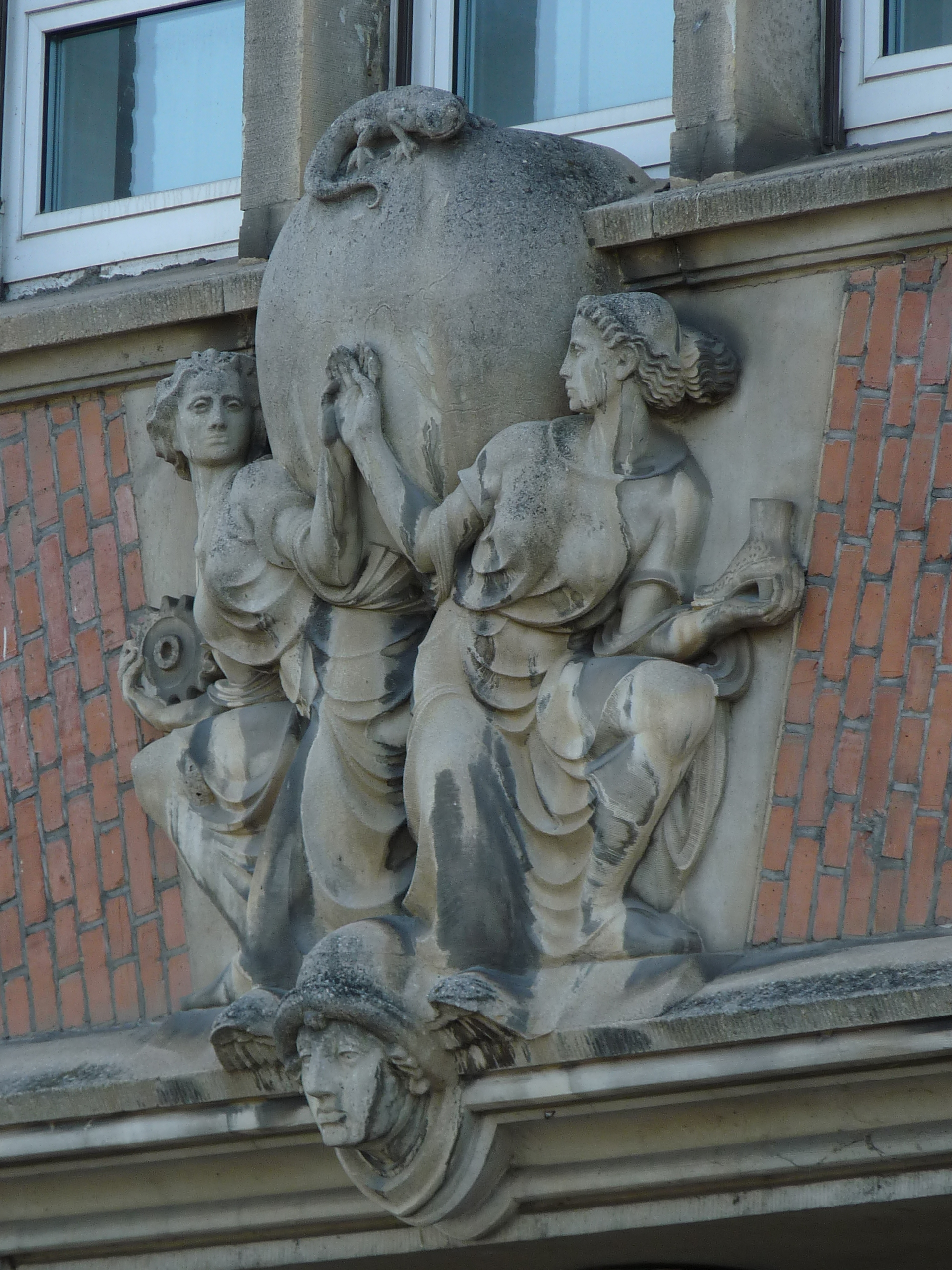 Kornwestheim - Salamander - Hauptgebäude - Tor - Einzelheit